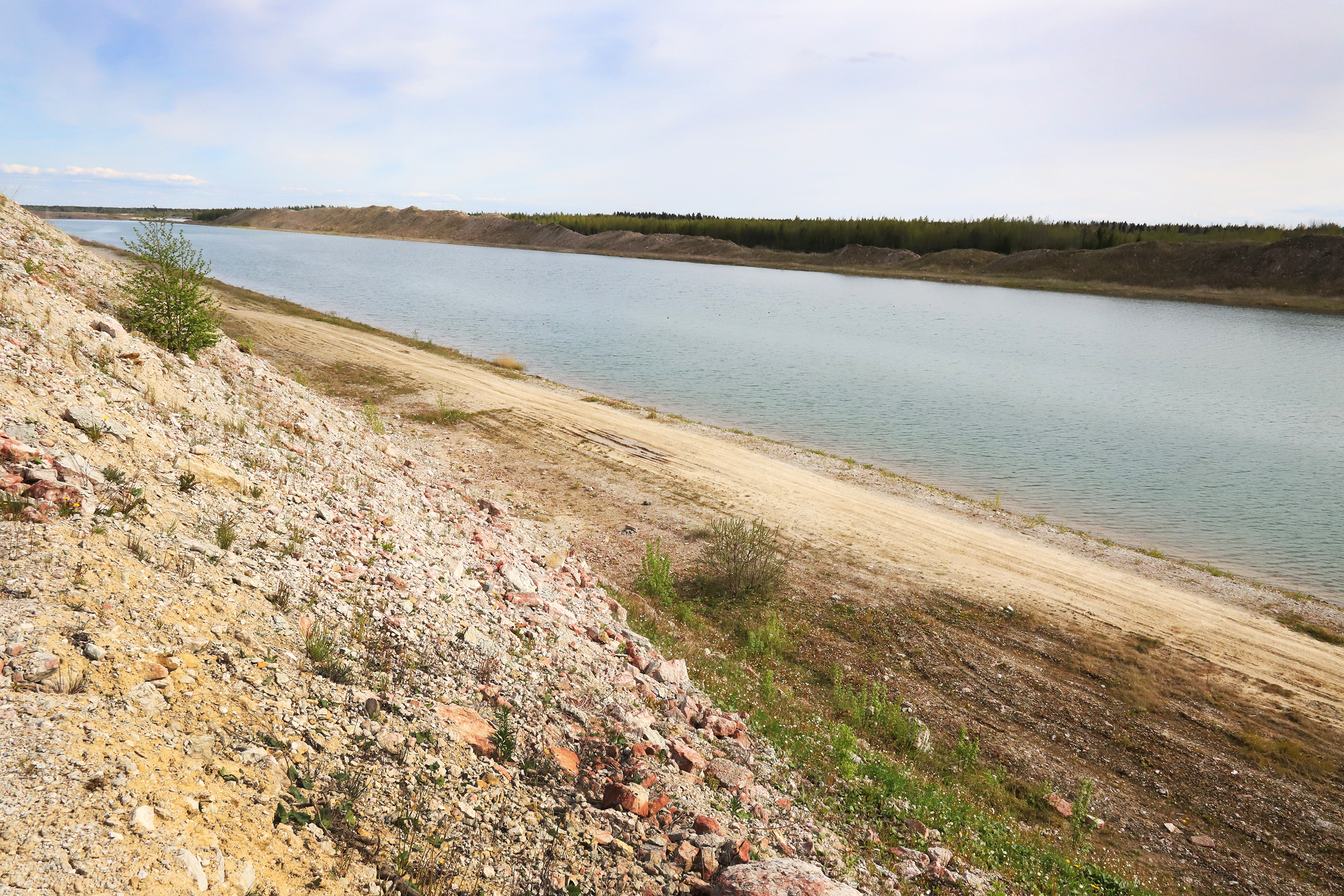 Aidu sõudekanal, mai 2020